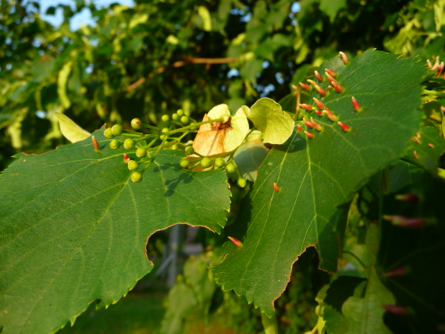 Lindenblätter (Sommer-Linde - Tilia platyphyllos) mit Horngallen von Gallmilben (Eriophyes tiliae)# herzlichen Dank an die Redaktion Biologie der de.WP für die Bestimmung